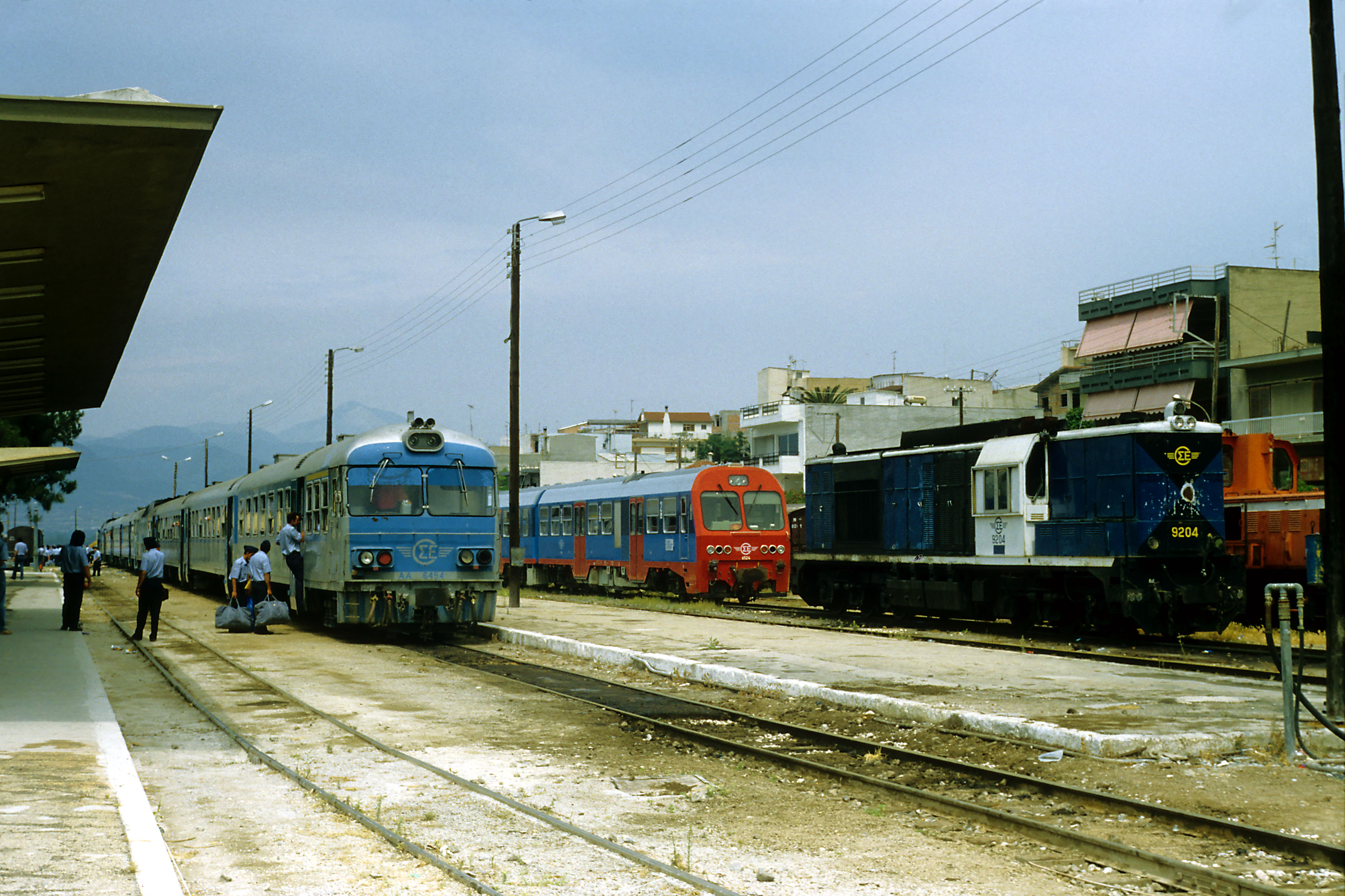 mit scheinbar vollem Betrieb, die Fahrzeuge sind mit Ausnahme des GANZ-Triebzuges jedoch streikbedingt abgestellt. Von Umspurung mit Neutrassierung und Betriebseinstellung gut zehn (bis zwanzig) Jahre später ahnt noch niemand etwas.